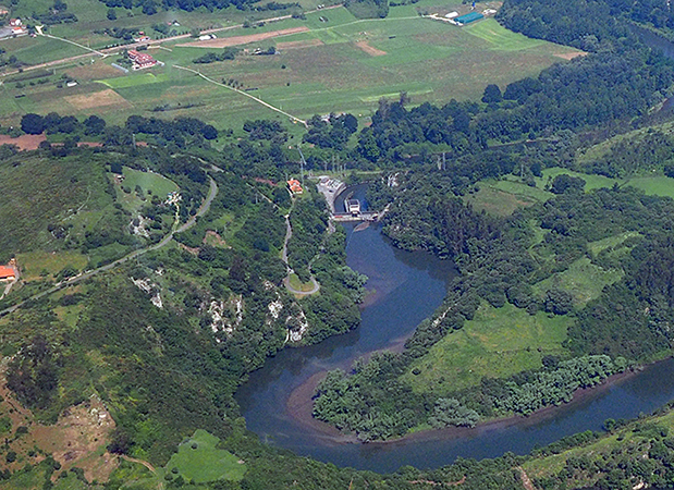 Embalse del rio Nora - Priañes, Asturias